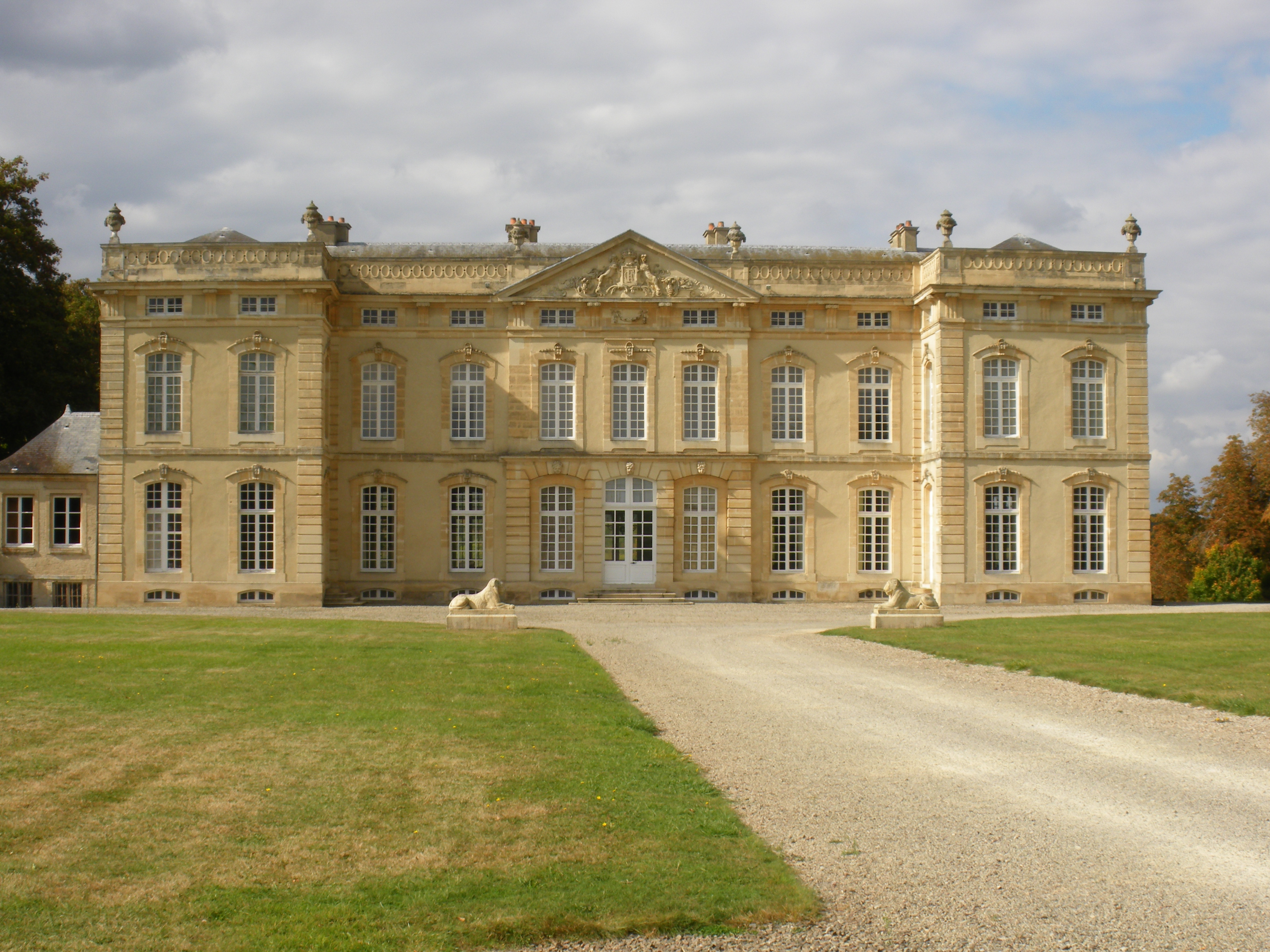 Chateau de Bourg St Leonard